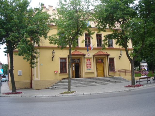 Wielicki Magistrat